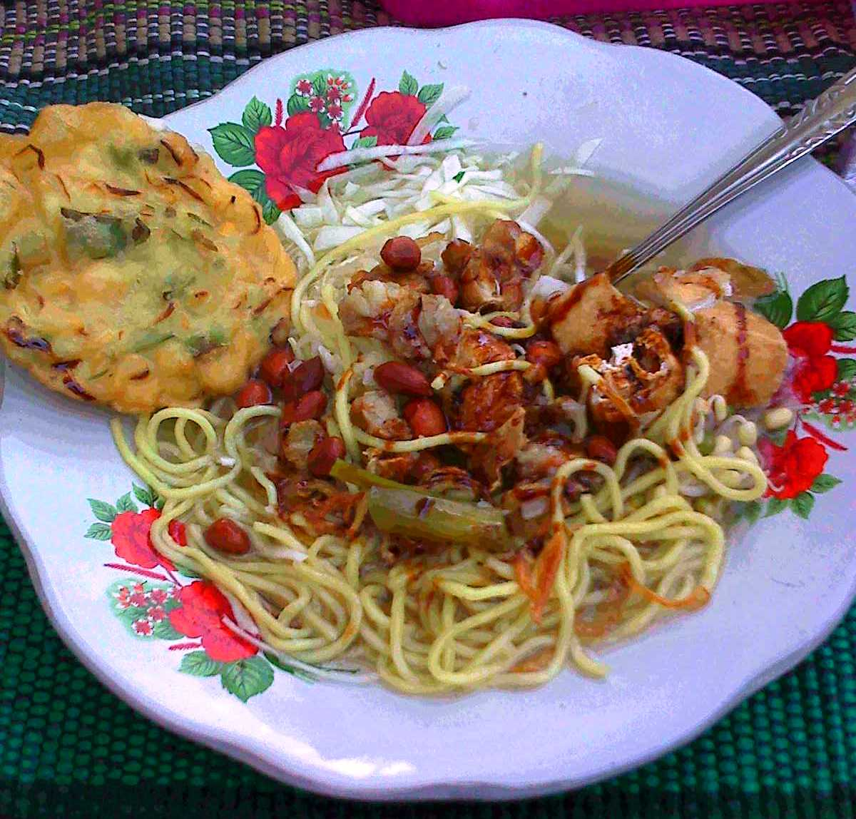 Tahu guling, a tofu-based dish from Surakarta, Indonesia